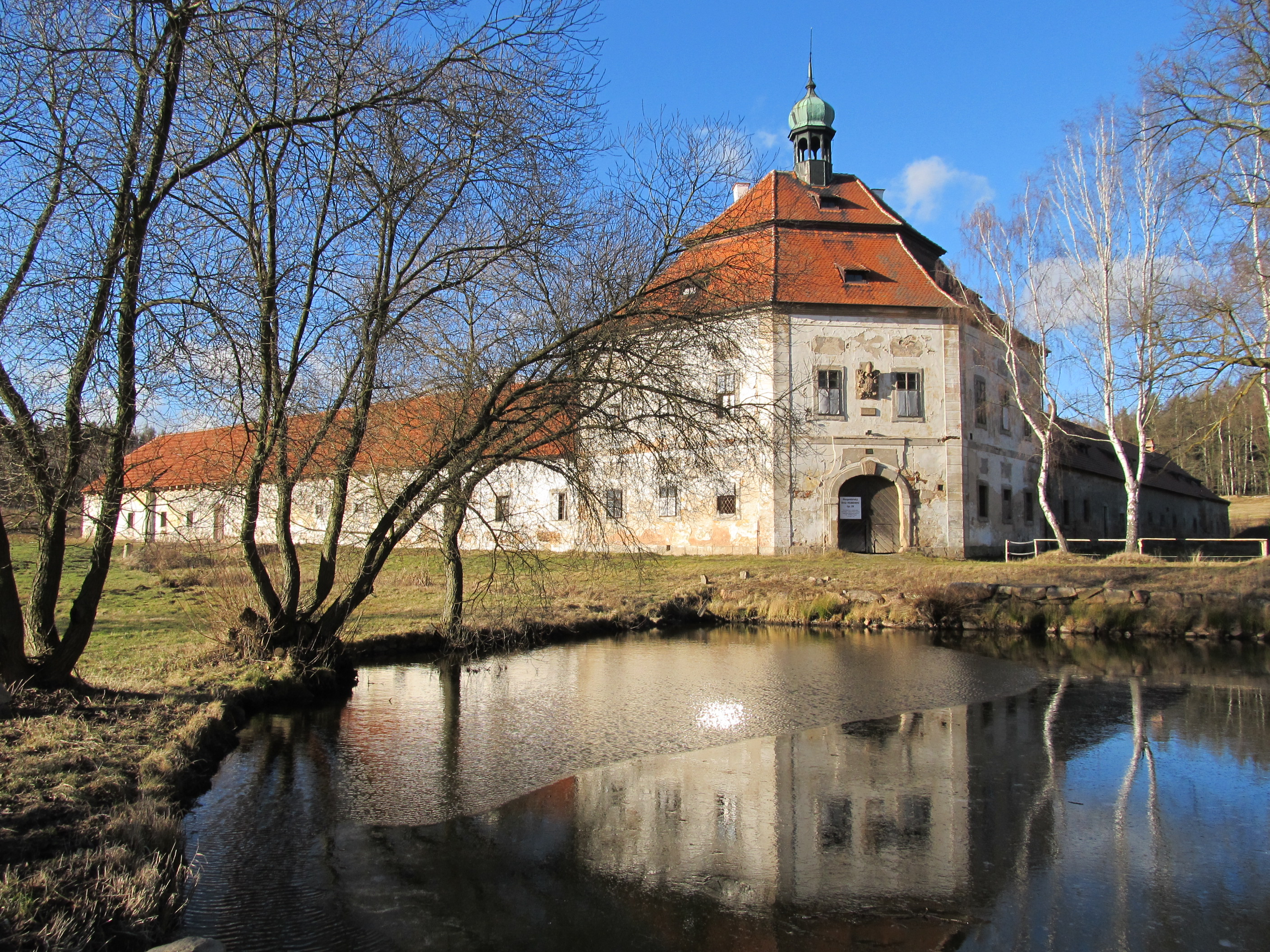 Hubenov - barokní dvůr plaského kláštera